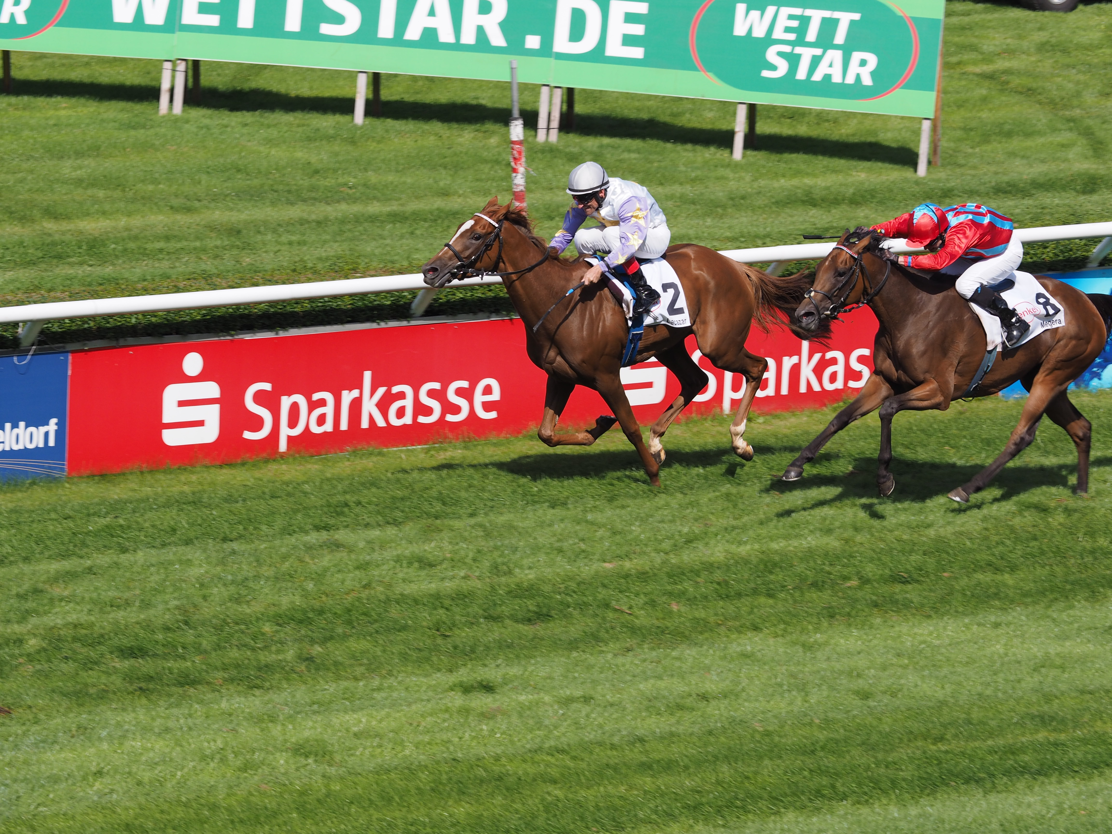 Preis der Diana 2017: Zweikampf zwischen Lacazar und Megera.